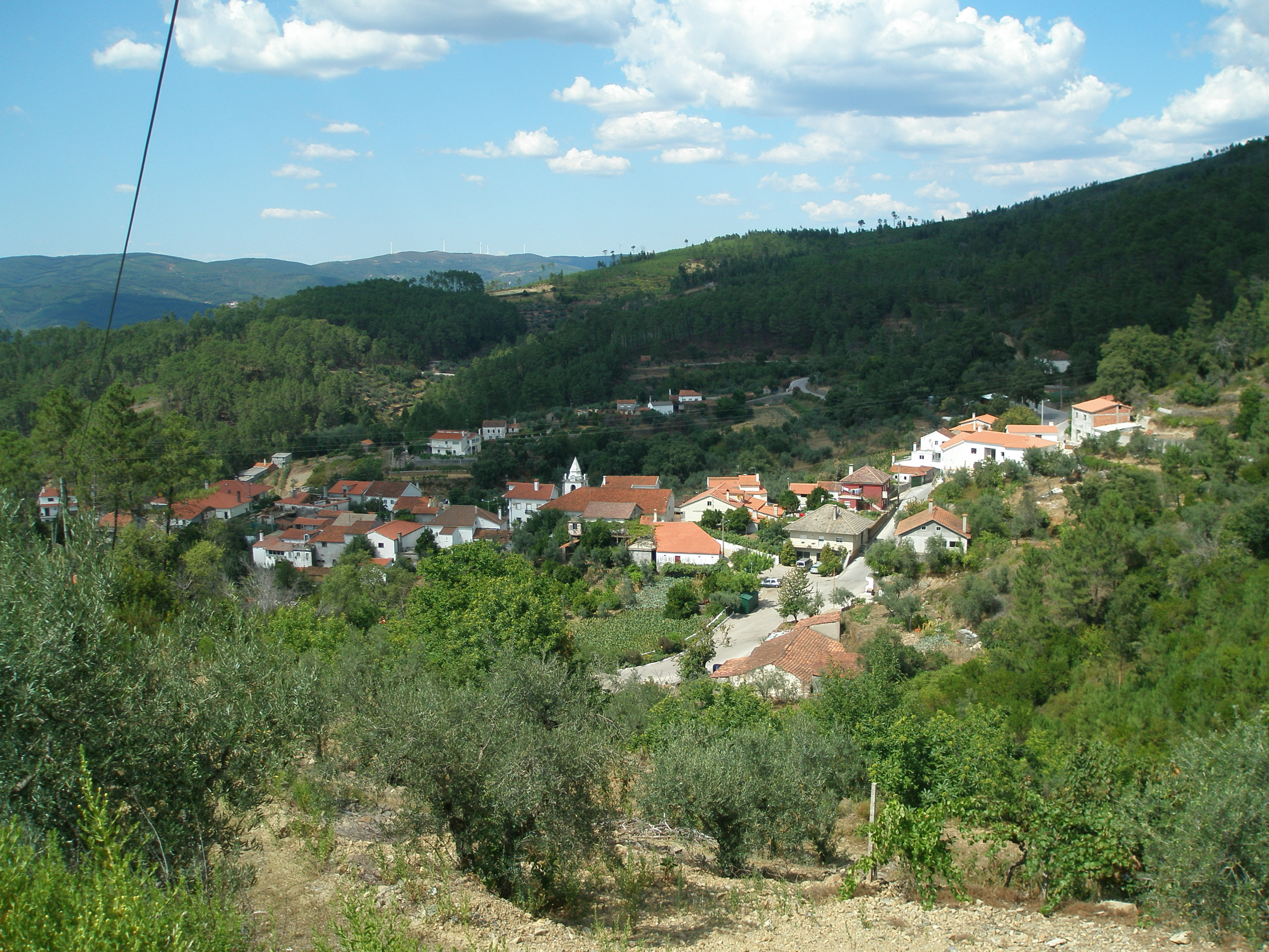 Vista panorâmica da freguesia de Figueiredo, concelho da Sertã